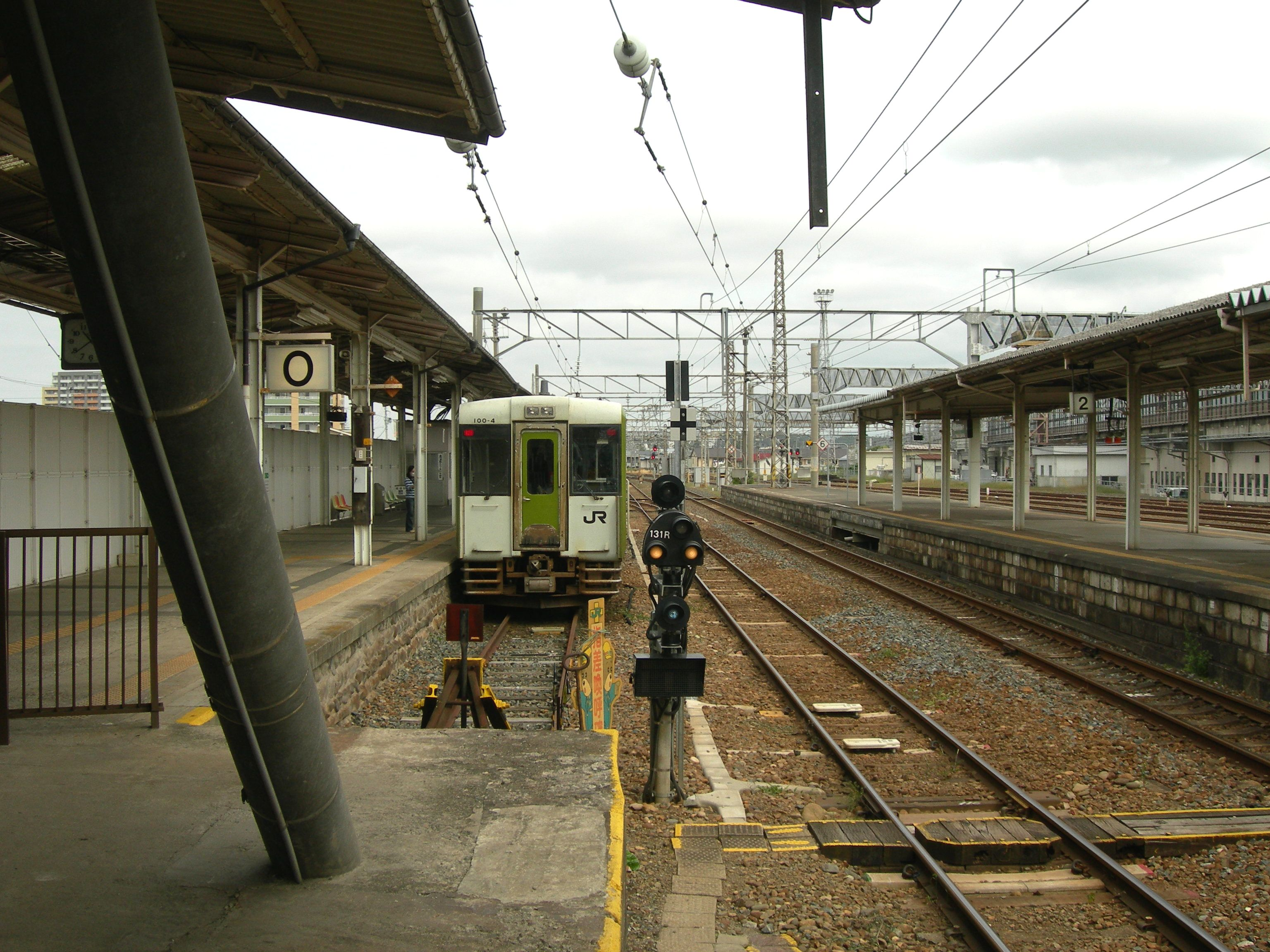 JR東日本 北上駅0番線ホーム